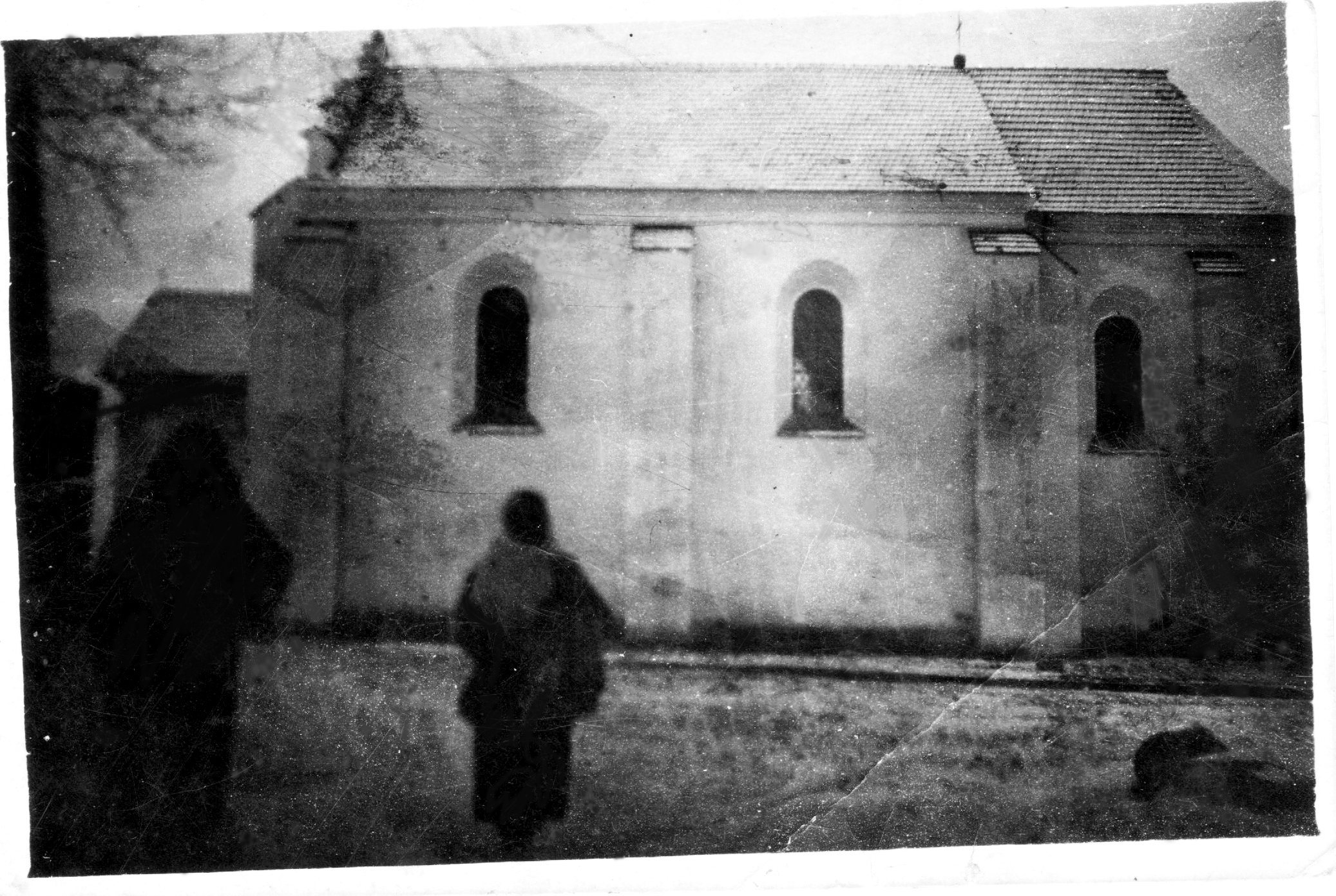 Беларуская (тарашкевіца): Крамяніца (Kramianica). Касьцёл Божага Цела і Сьвятога Юр’я і кляштар канонікаў лятэранскіх